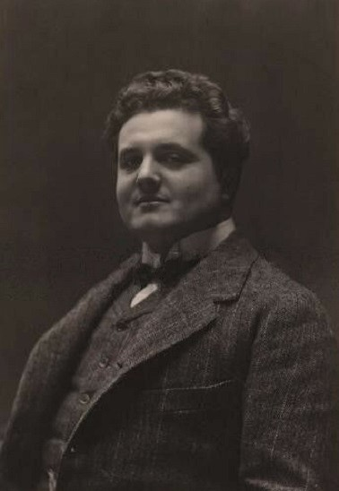 Emilio Perea